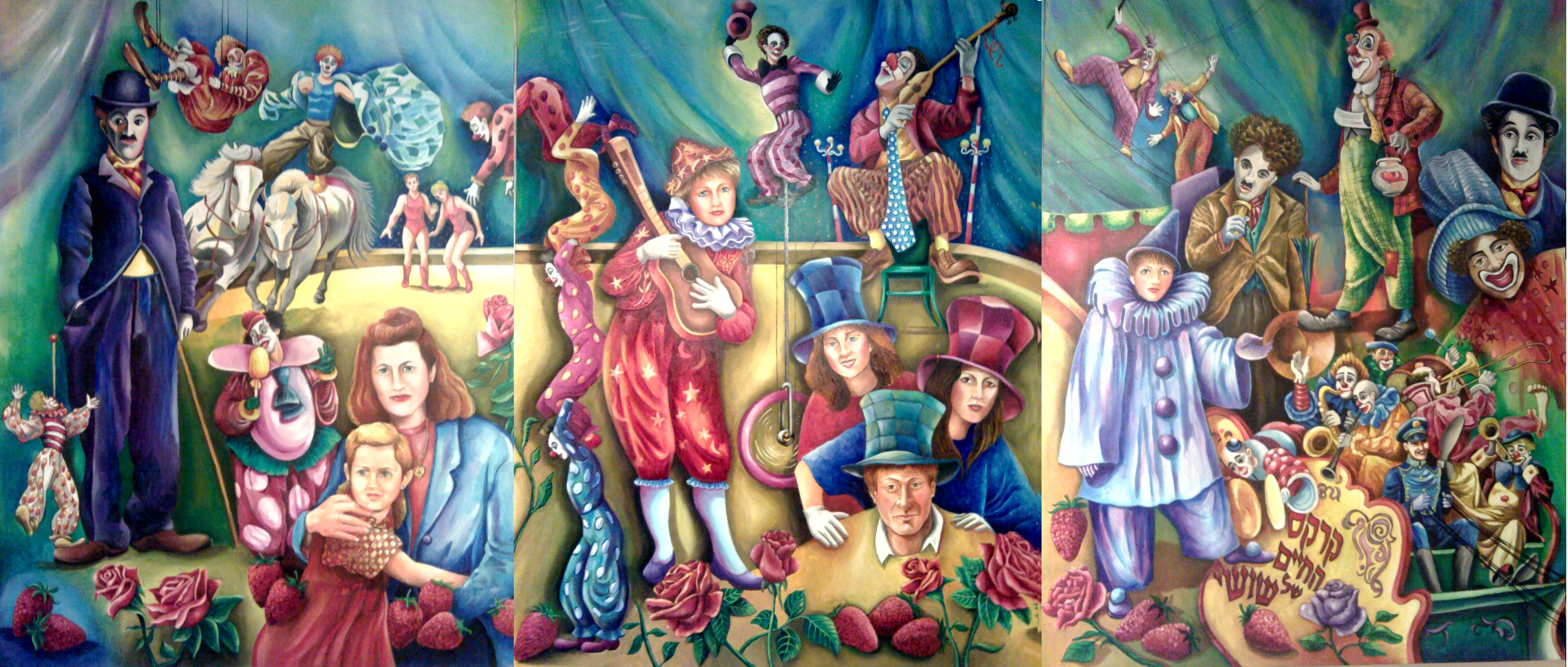 קרקס החיים של שושי, שושי חייט